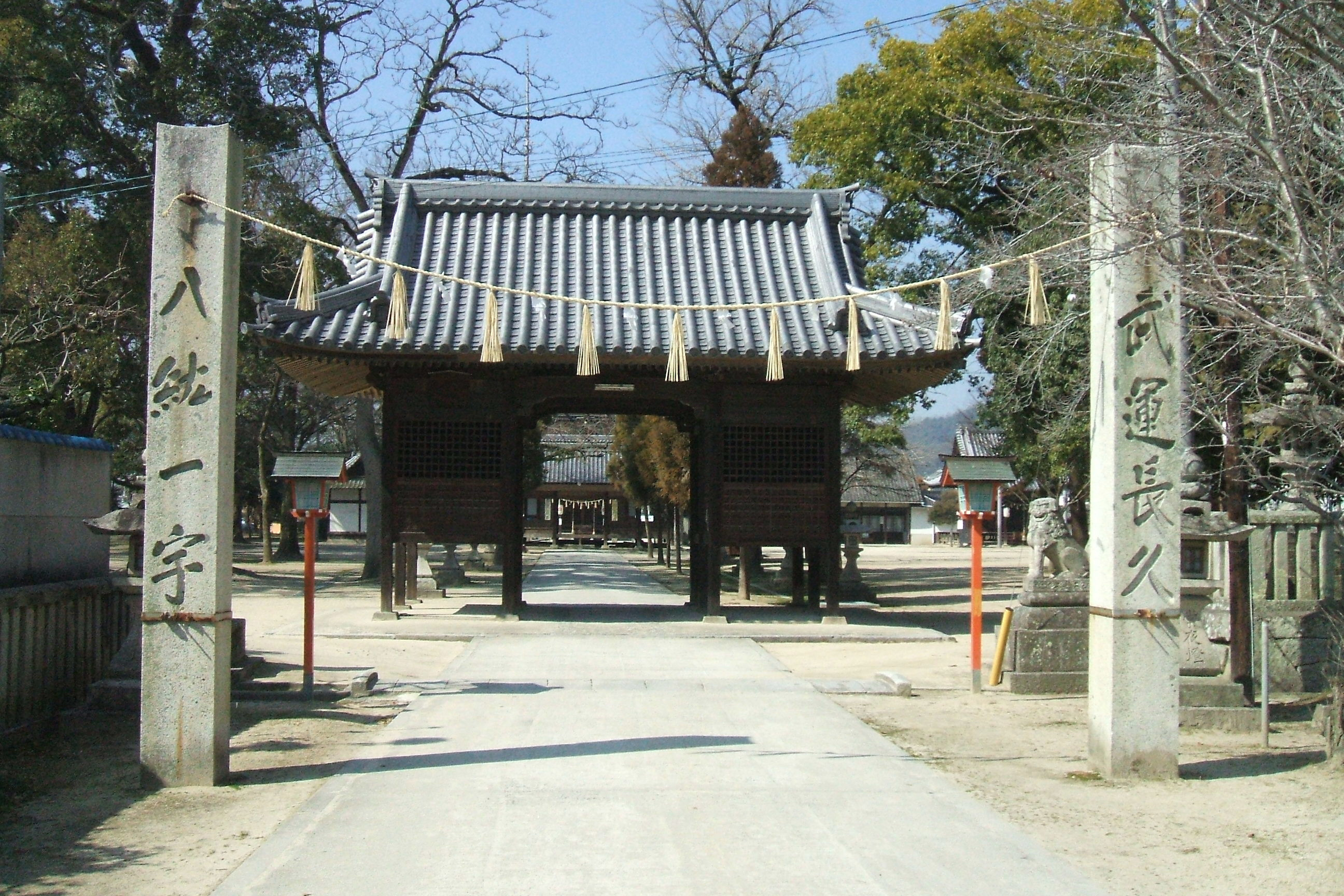 広島県福山市にある素盞嗚神社の境内。